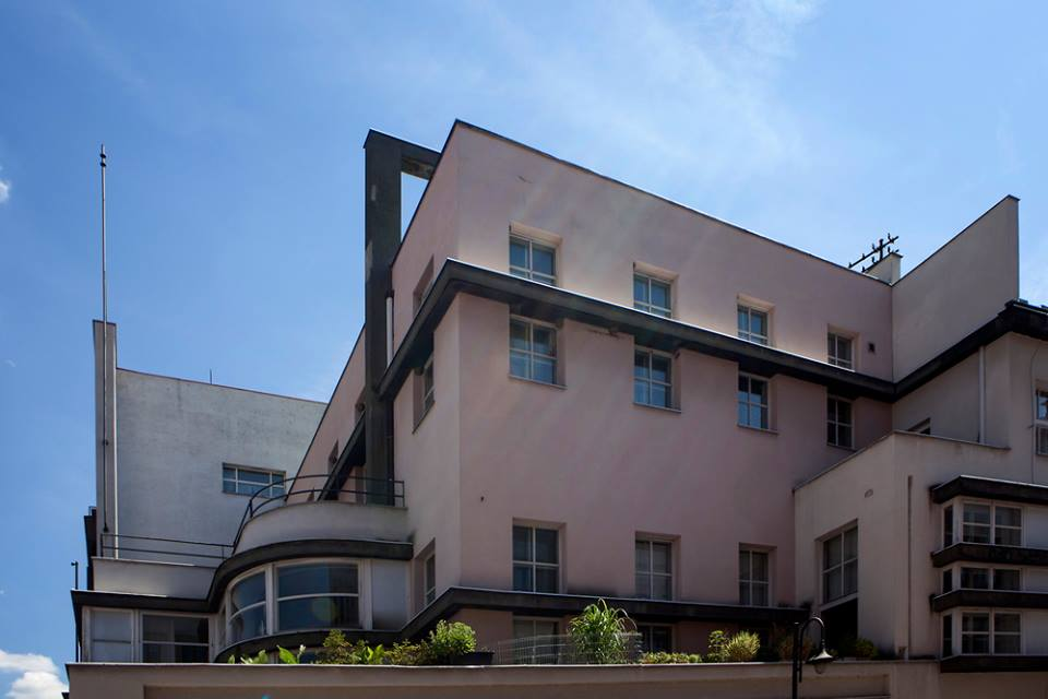 Permanetní Expozice Jiří Kroha a Výstavní síň pro jednoroční výstavy, Benátky nad Jizerou; iniciátorka a kurátorka Irena Jůzová